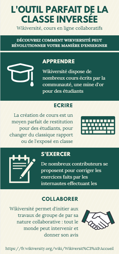 infographie à destination des étudiants